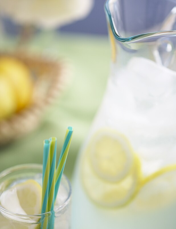 Lemonade.